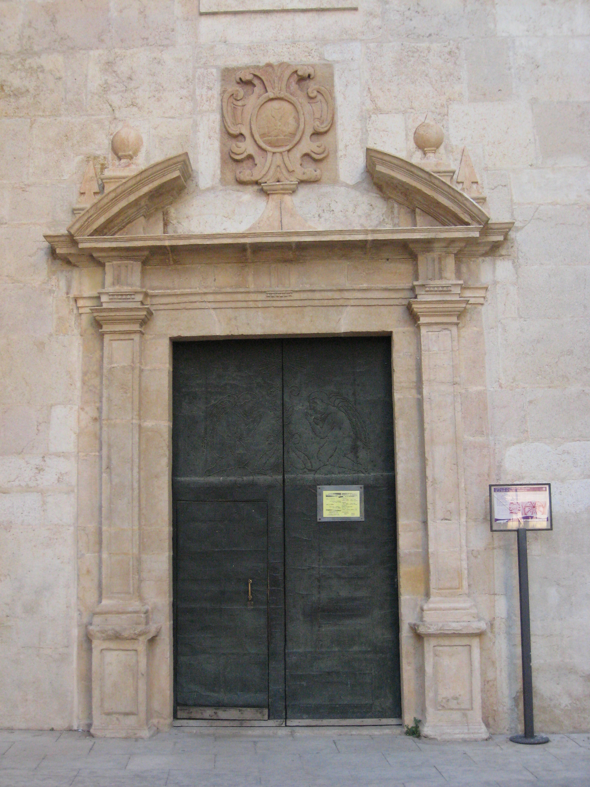 Portada de la capella de la Comunió de l'Església de la Mare de Déu de l'Assumpció de Vinaròs (Baix Maestrat)